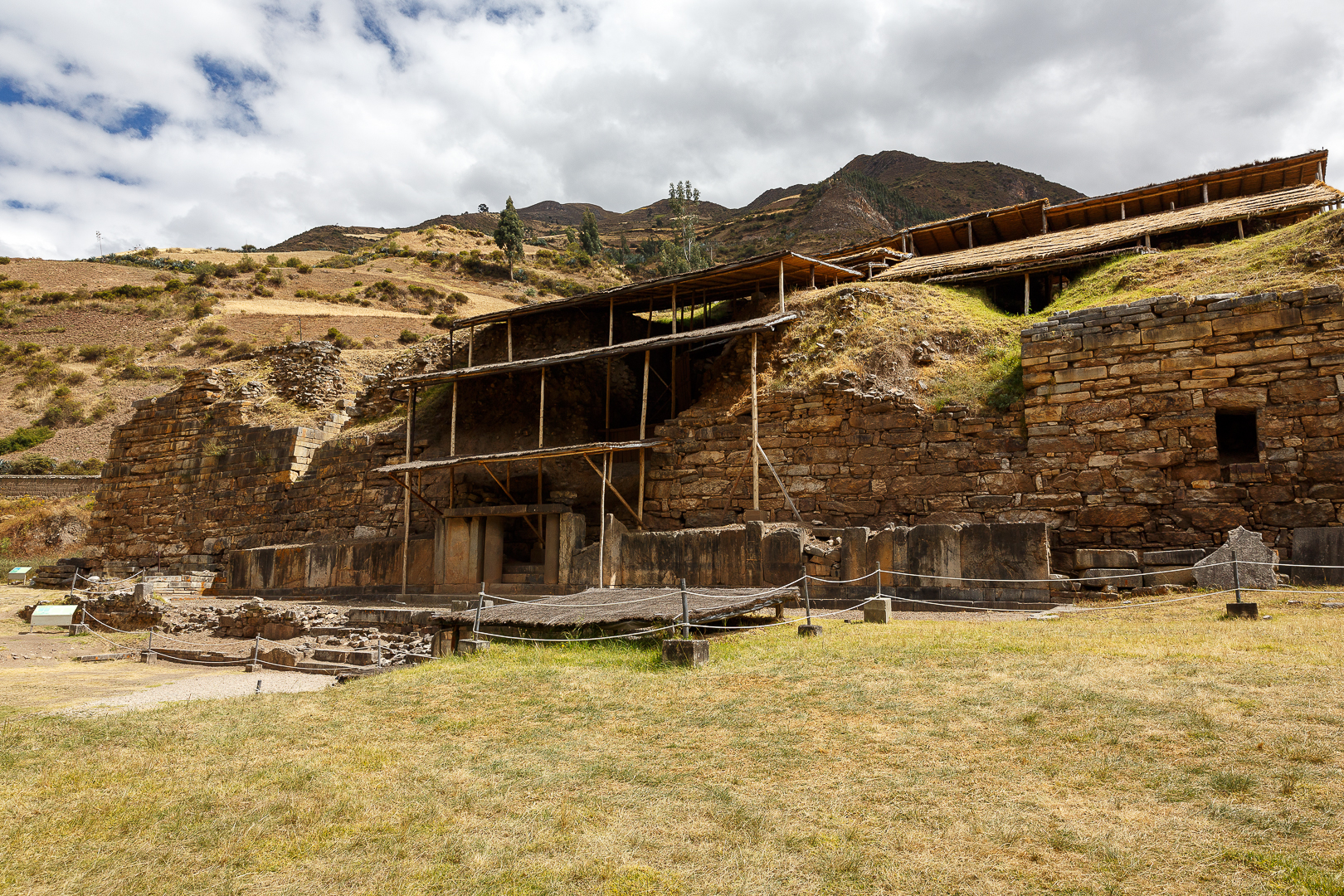 Wiki Expedição Andes Peruanos - Julho de 2018. Ruínas de Chavin de Huantar, Ancash - Peru.